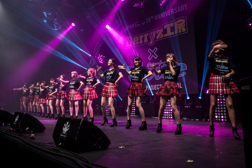 Berryz Kobo x °C-ute